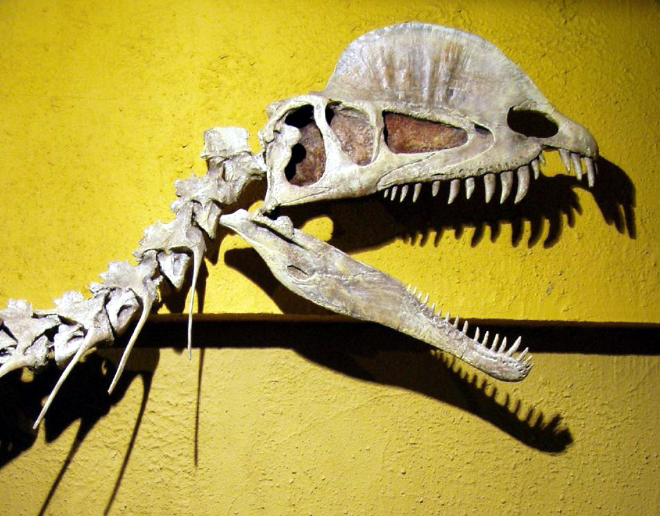 Dilophosaurus skull, Royal Tyrrell Museum.